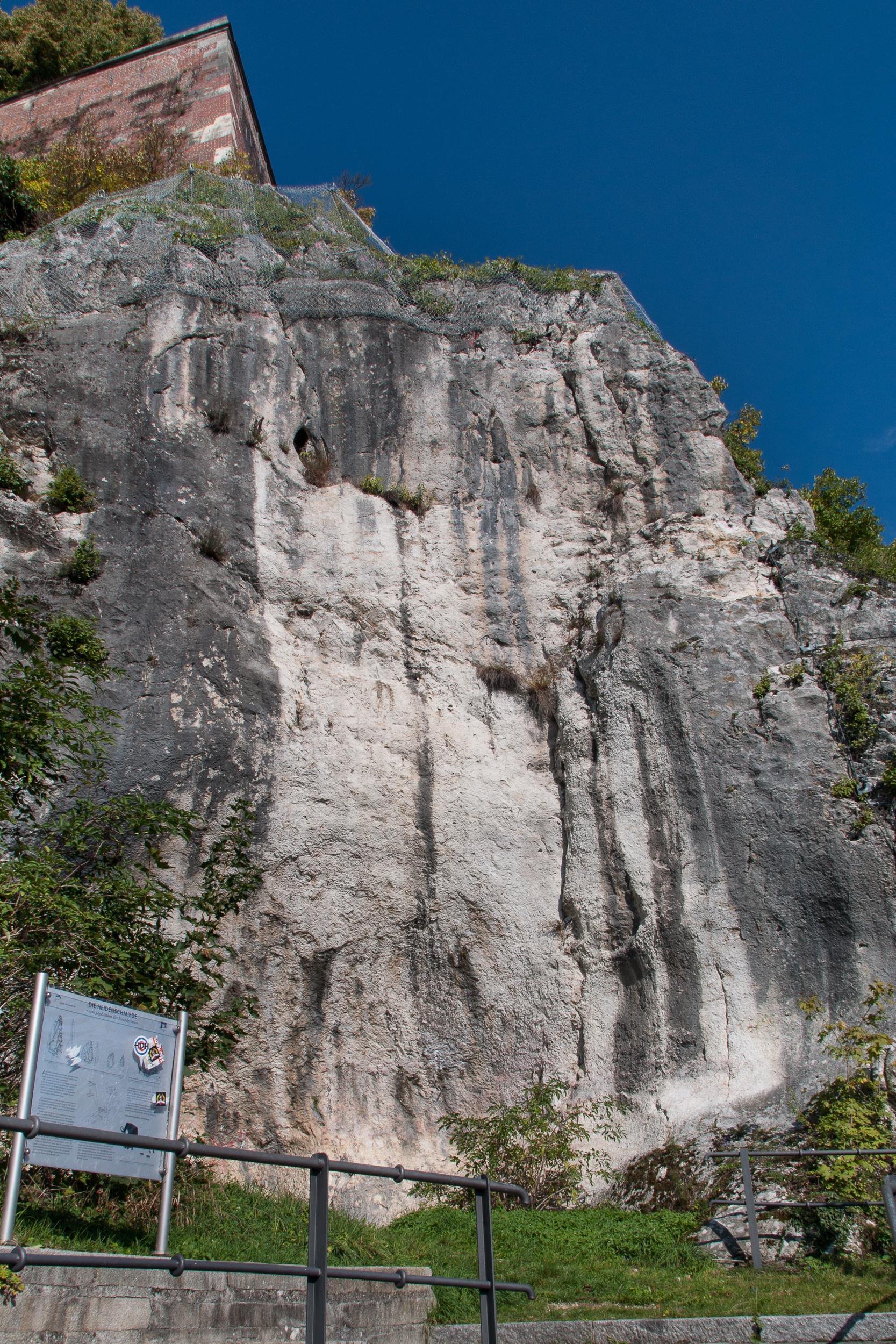 Der Abri Heidenschmiede in Heidenheim an der Brenz. Etwas oberhalb der Bildmitte nach links versetzt ist das "Uhuloch" zu erkennen.